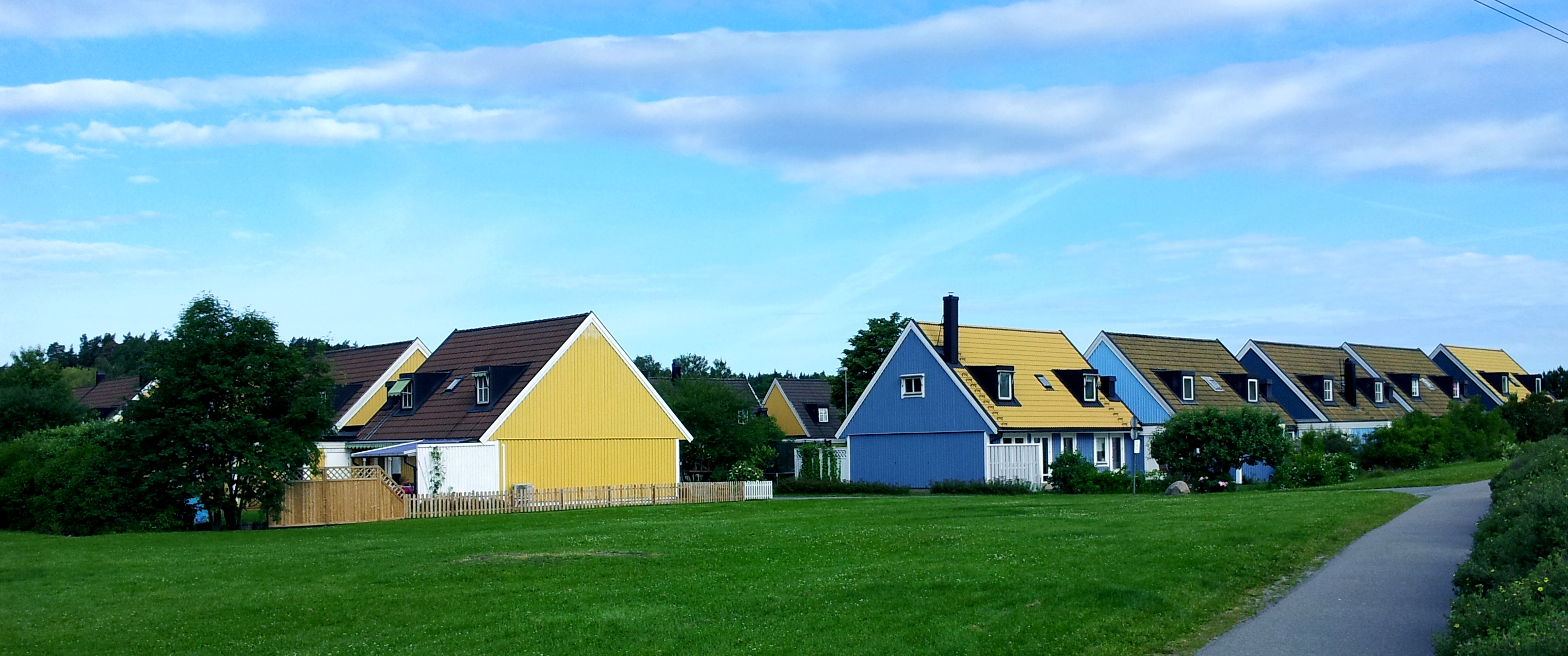 Bostadsområdet Eneby gård, Enebyberg, Danderyds kommun